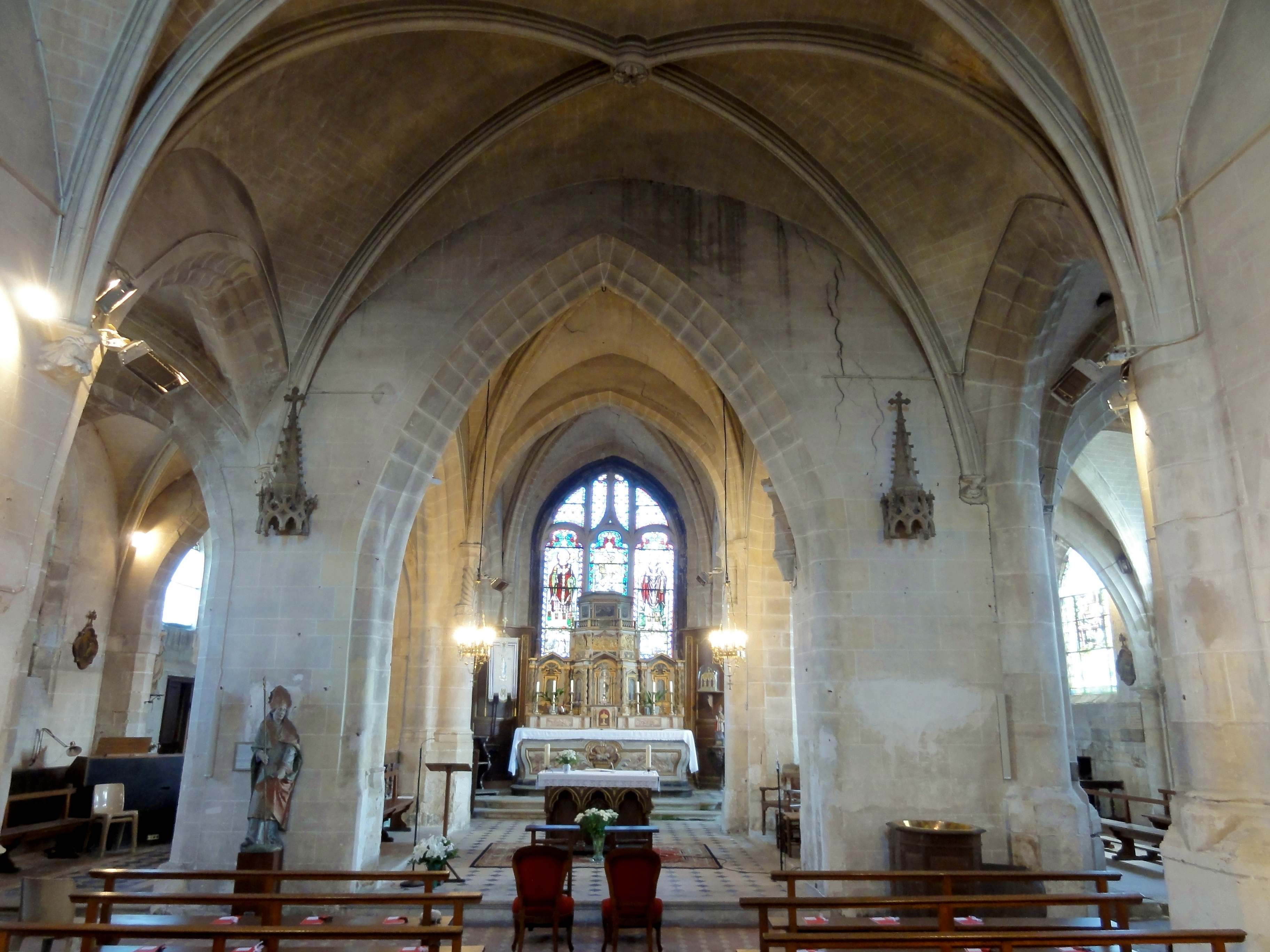 Intérieur de l'église (voir titre).